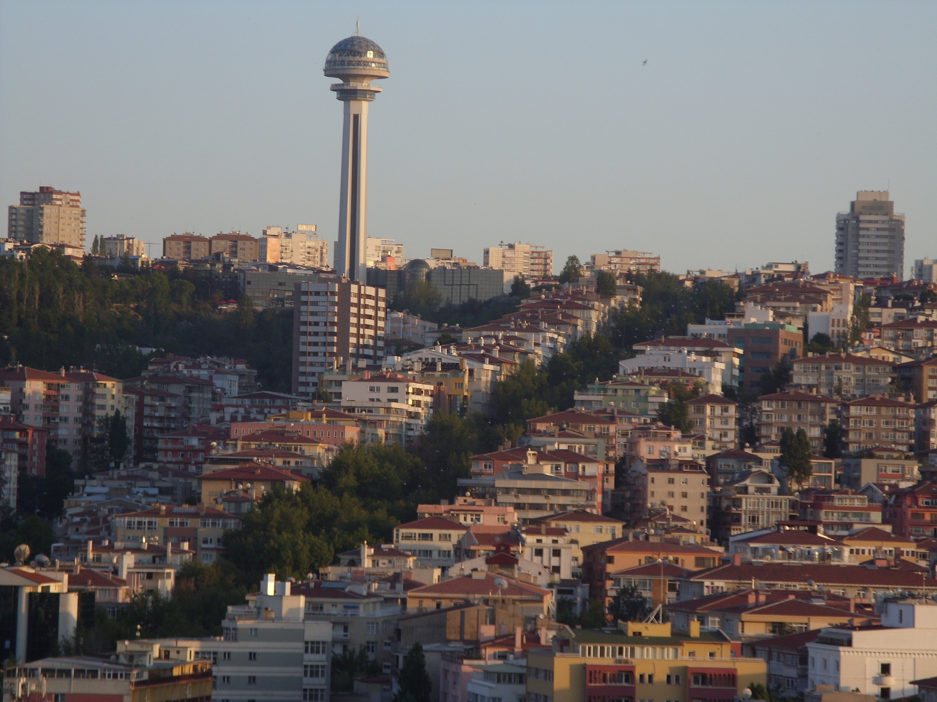 Cinnah Ve atakule